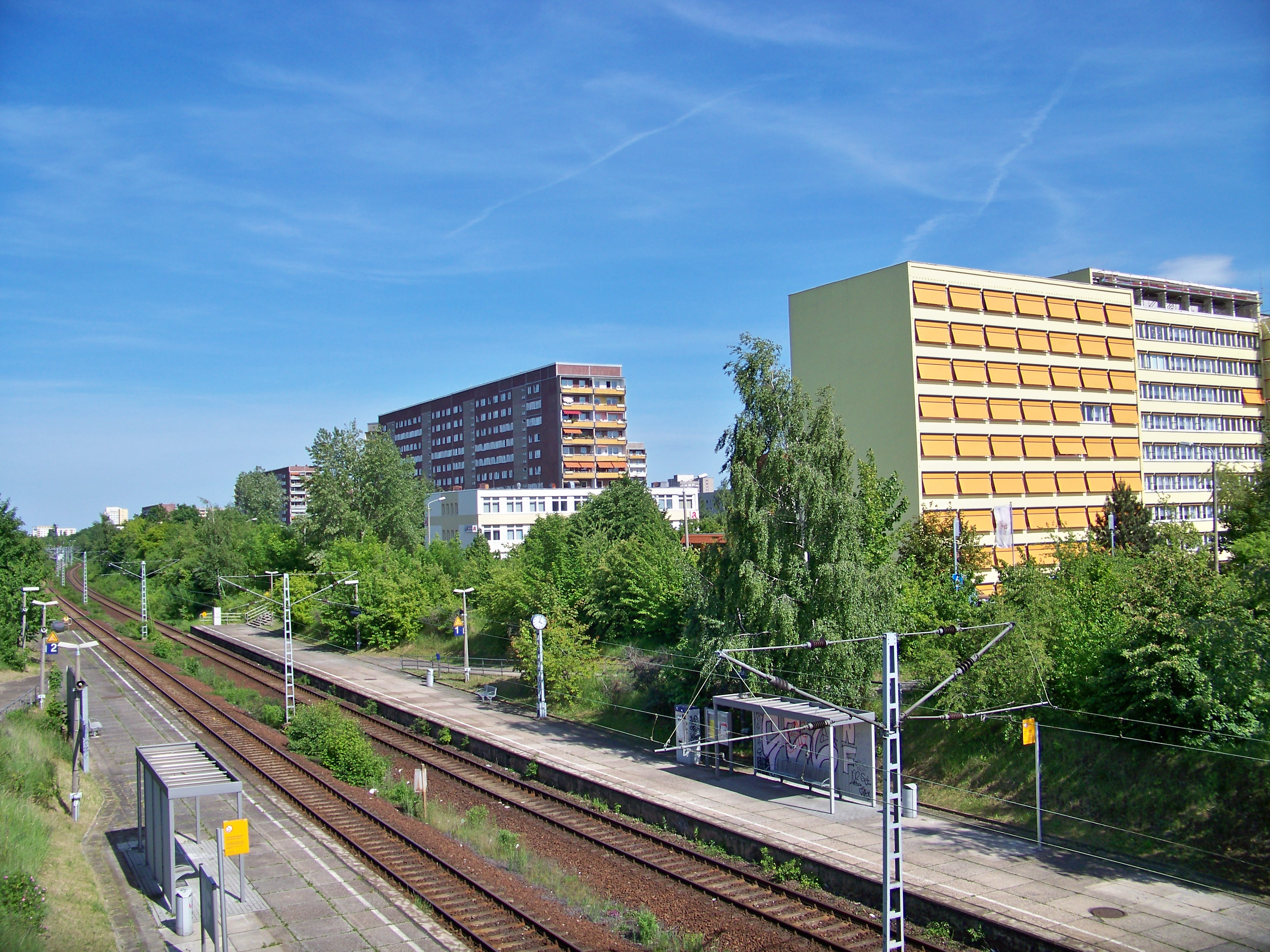 Leipzig-Grünau von der Brücke Kiewer Straße, unten S-Bahnhalt Karlsruher Straße